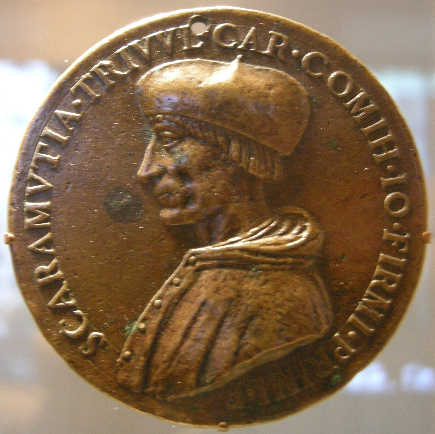 Artista milanese, Scaramuccia di Gianfermo Trivulzio, 1518-25